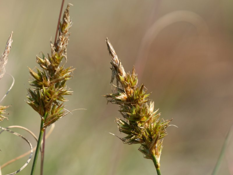 Soldaten-Segge (Carex arenaria), Detail